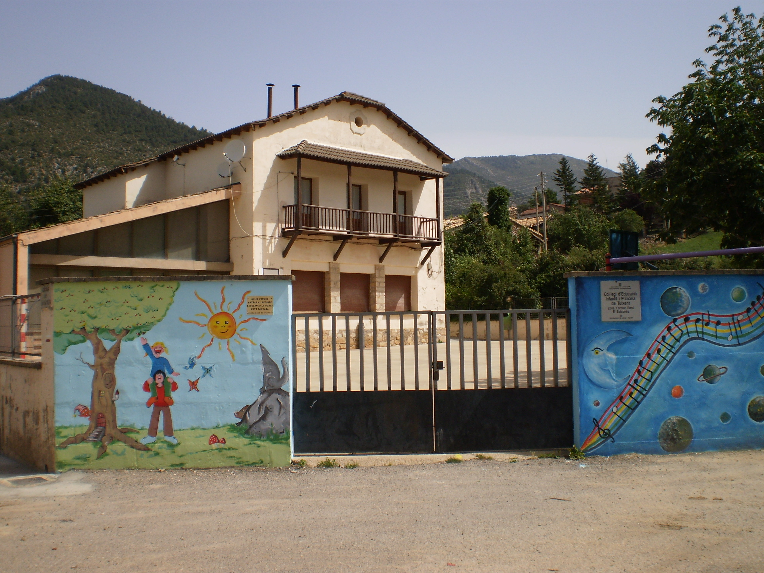 CEIP de Tuixent